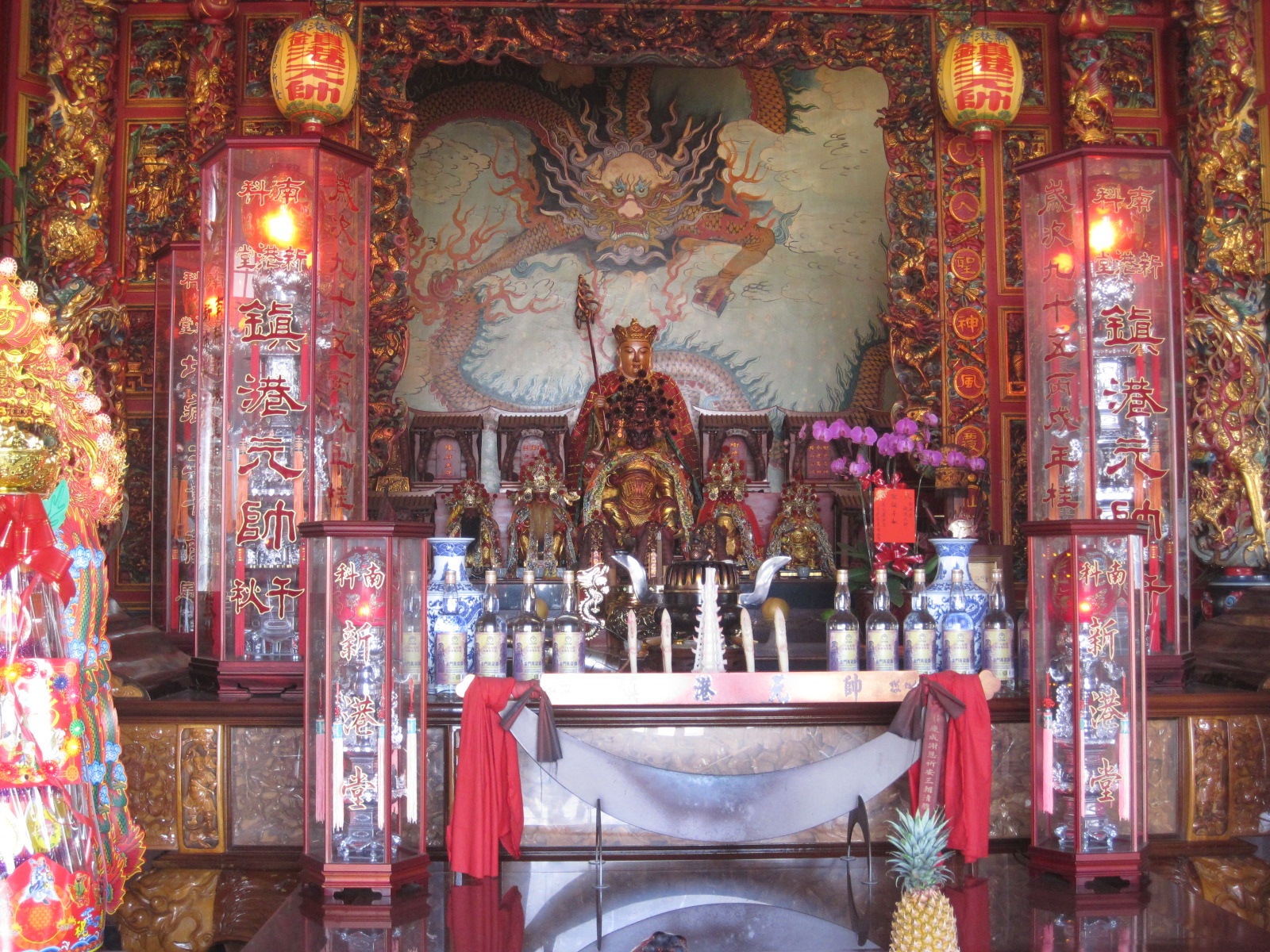 南科新港堂神龕